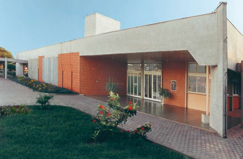 Foto da entrada principal da Biblioteca do Campus